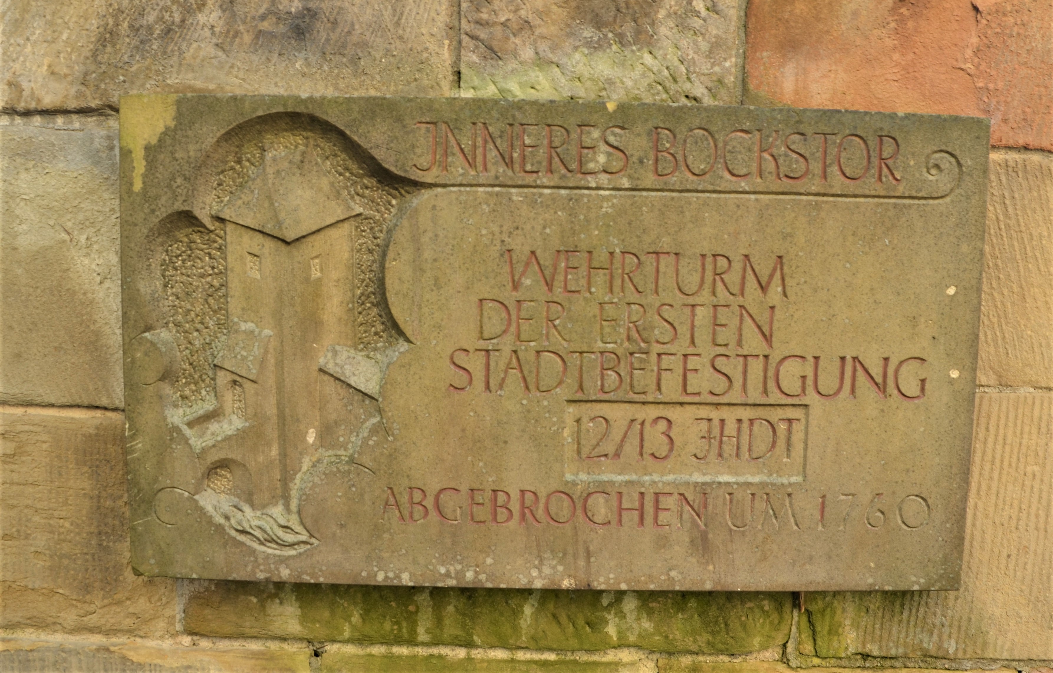 Hinweis auf das Innere Bockstor der ersten Stadtbefestigung in Schwäbisch Gmünd